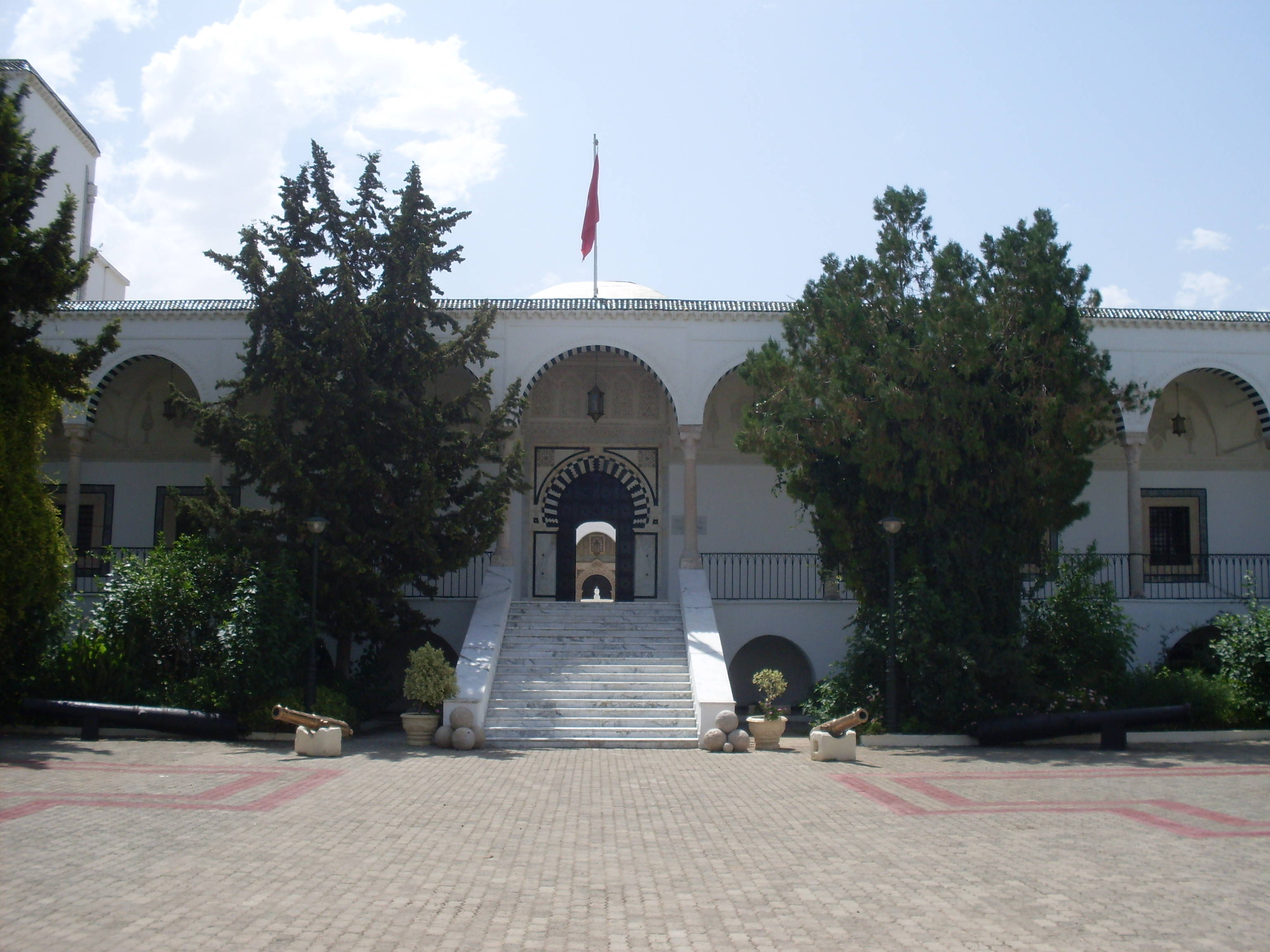 Entrée du palais de la rose de la Manouba